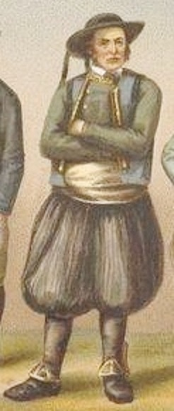 Homme de Plogonnec : chapeau rond à longs rubans de velours, veste et gilet bleus, épaisse ceinture de laine, larges braies plissées à l'ancienne mode, guêtres d'étoffe, boutonnées au bas de la jambe à l'aide de cinq ou six boutons de cuivre.